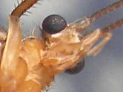 Some species of Caddisfly (Halesus cf. tesselatus) Location: Soderstorf (Lüneburger Heide), Germany Keywords: trichoptera, caddisfly --- nl: Eén of andere Schietmot Locatie: Soderstorf (Lüneburger Heide), Duitsland Trefwoorden: schietmot, kokerjuffer --- de: Irgendeine Art Köcherfliege